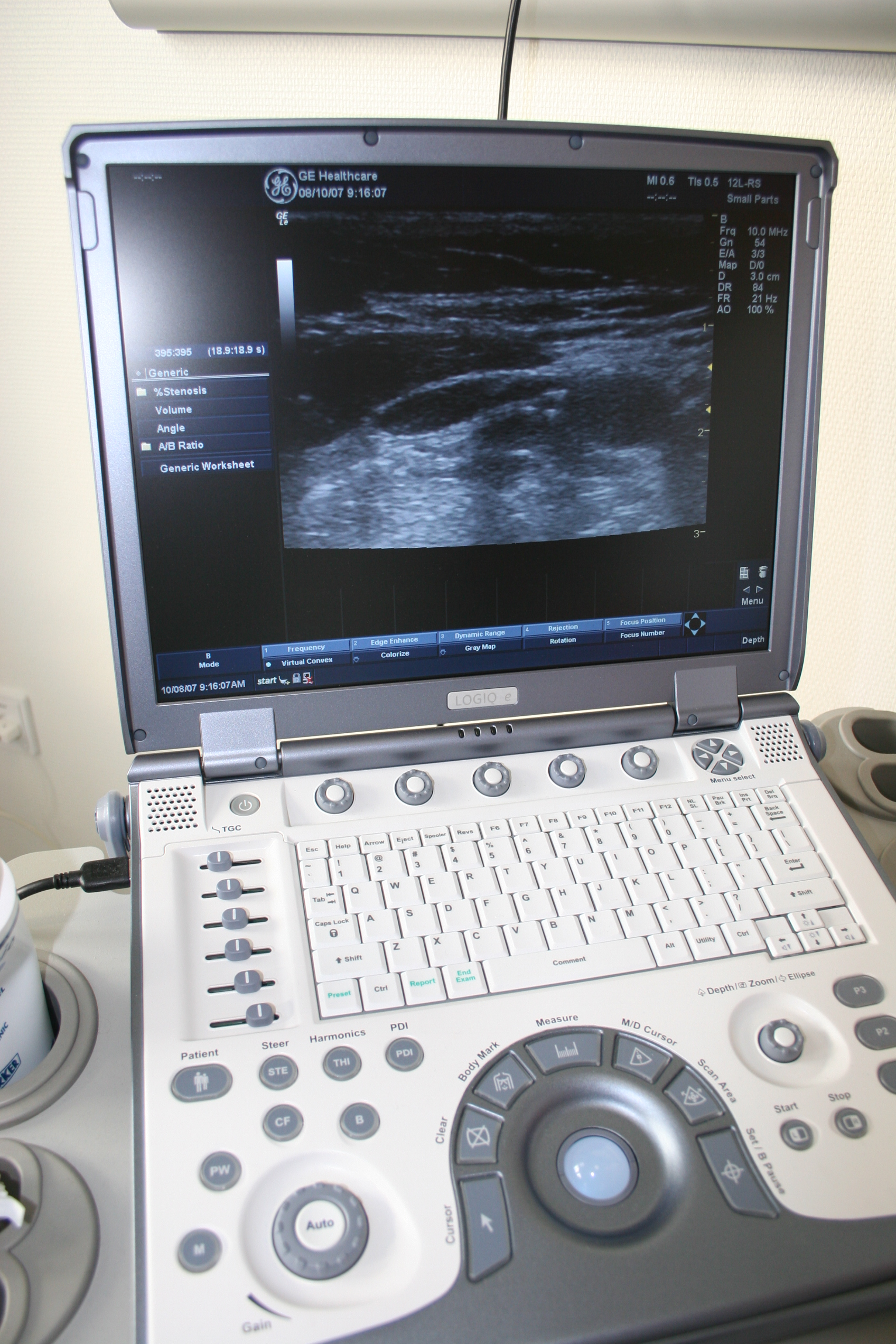 Ultralydskanner